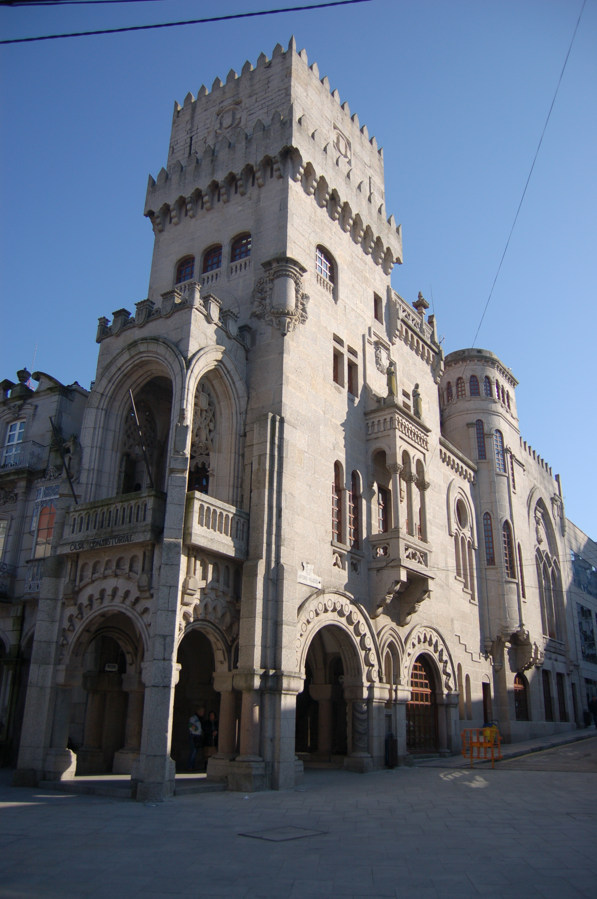 Casa Consistorial do Porriño, sitúado na rúa Antonio Palacios e na Praza do Arquitecto Antonio Palacios.